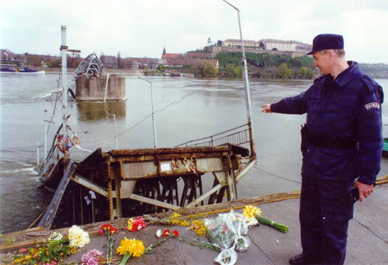 Нато бомбардовање СР Југославије 1999. Нато авијација срушила је Варадински мост на Дунаву који повезује бачку и сремску страну Новог Сада.